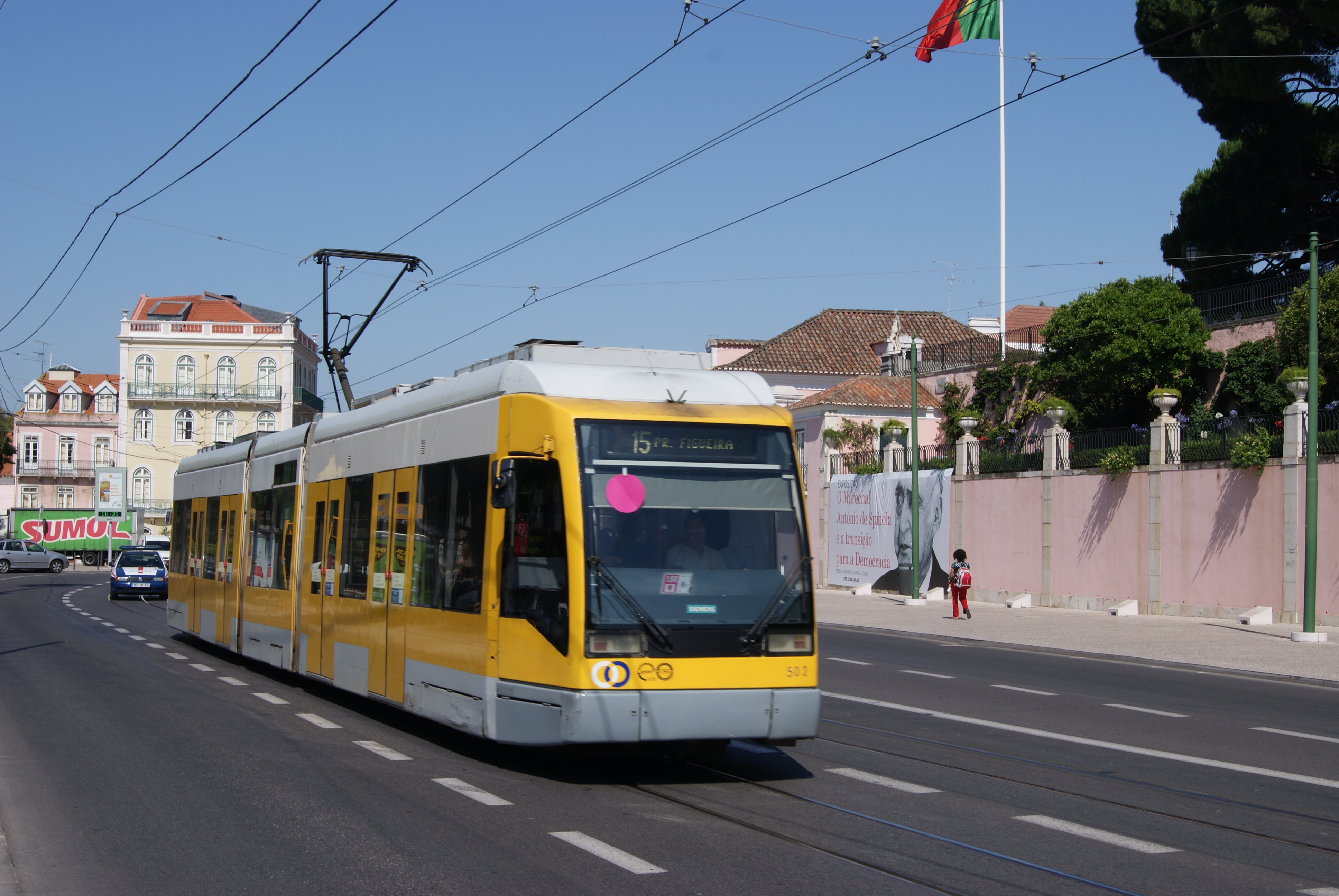 Photo: Trams aux Fils. Ligne 15, direction Pl. FIGUEIRA Rua da Junqueira Tram 502 de la série 501-510